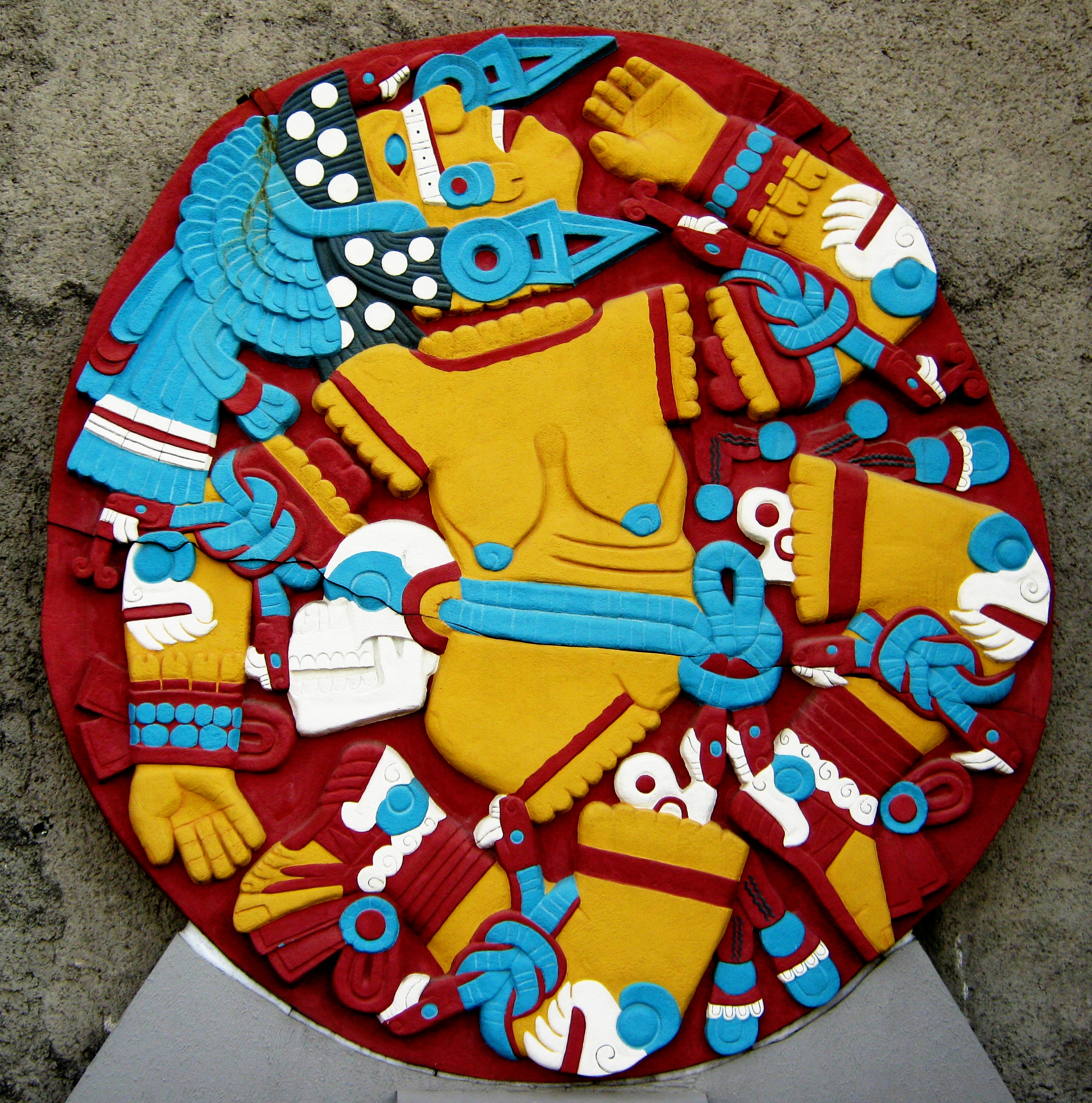 Coyolxāuhqui. Exhibición en el Museo del Templo Mayor mostrando los colores que se cree tenía la imagen original